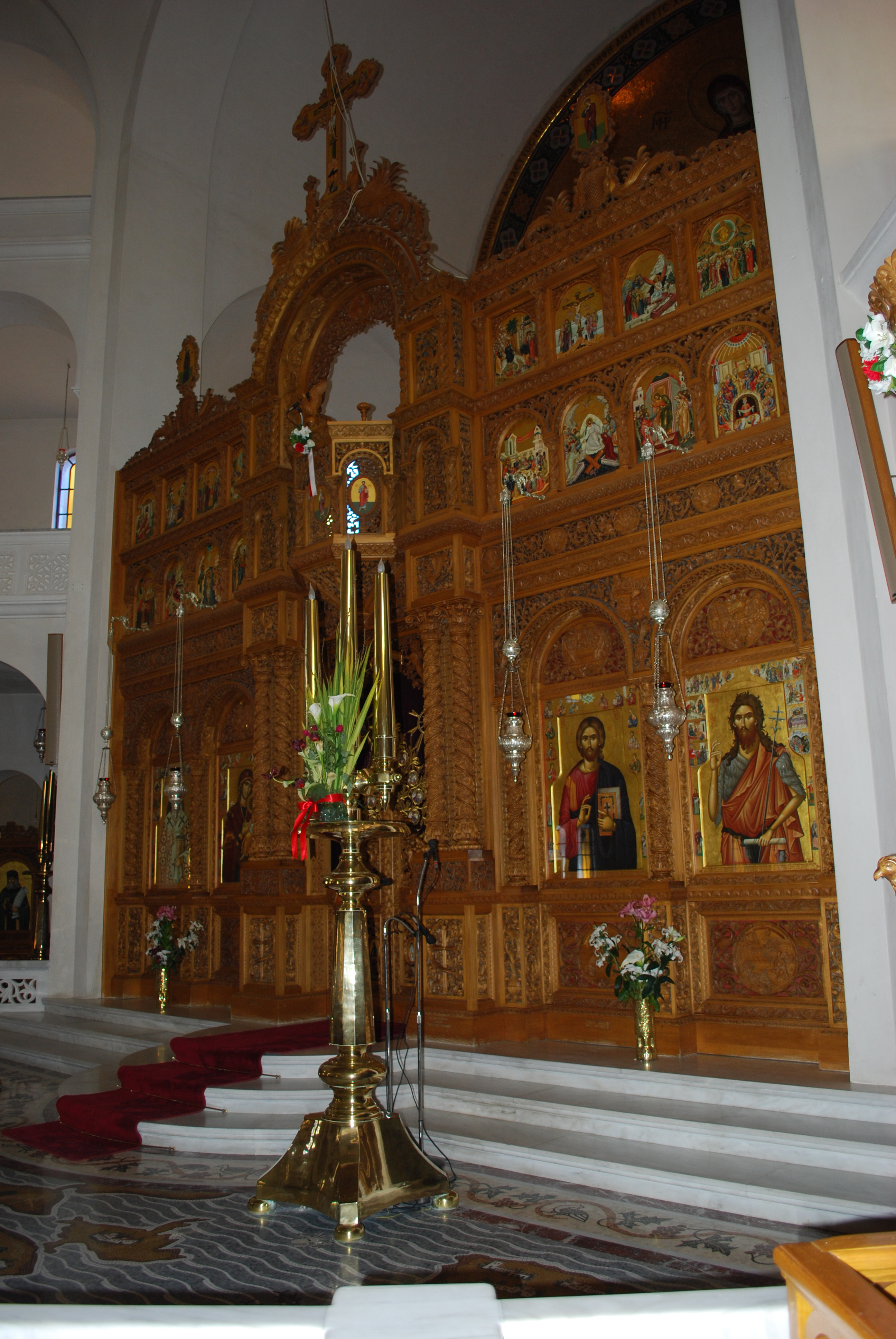 La cathédrale Saint-Nectaire à Egine.